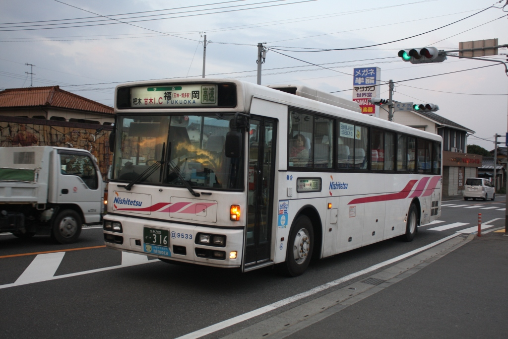 西鉄からの管理委託車両